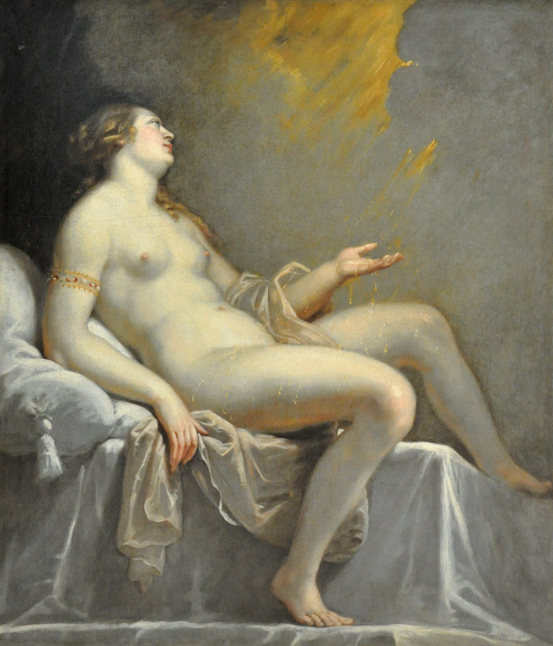 Cliché pris en 2012 au Musée des Beaux-Arts de Rouen (où il est précisé que le tableau est attribué au peintre).